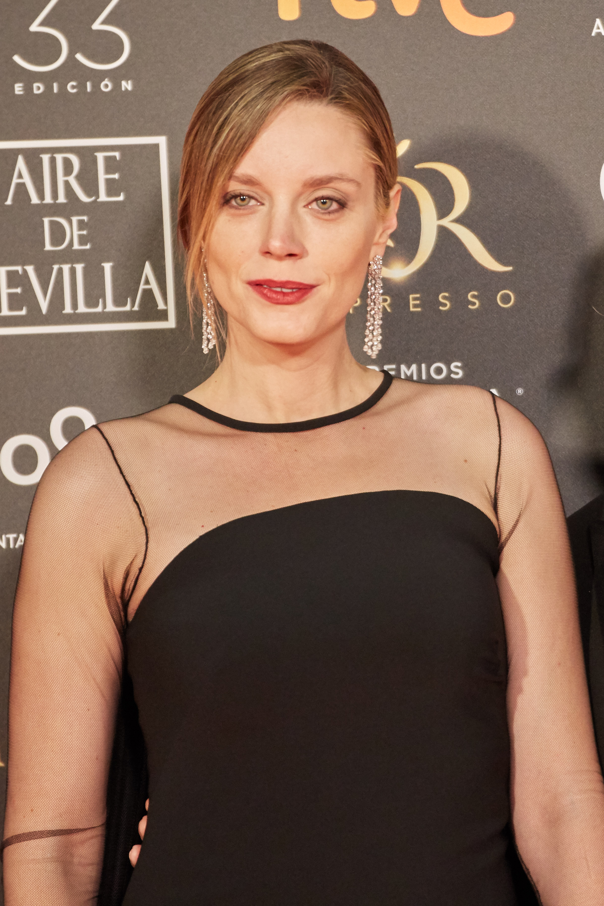 Carolina Bang en la alfombra roja de los Premios Goya celebrados en Sevilla en Febrero 2019